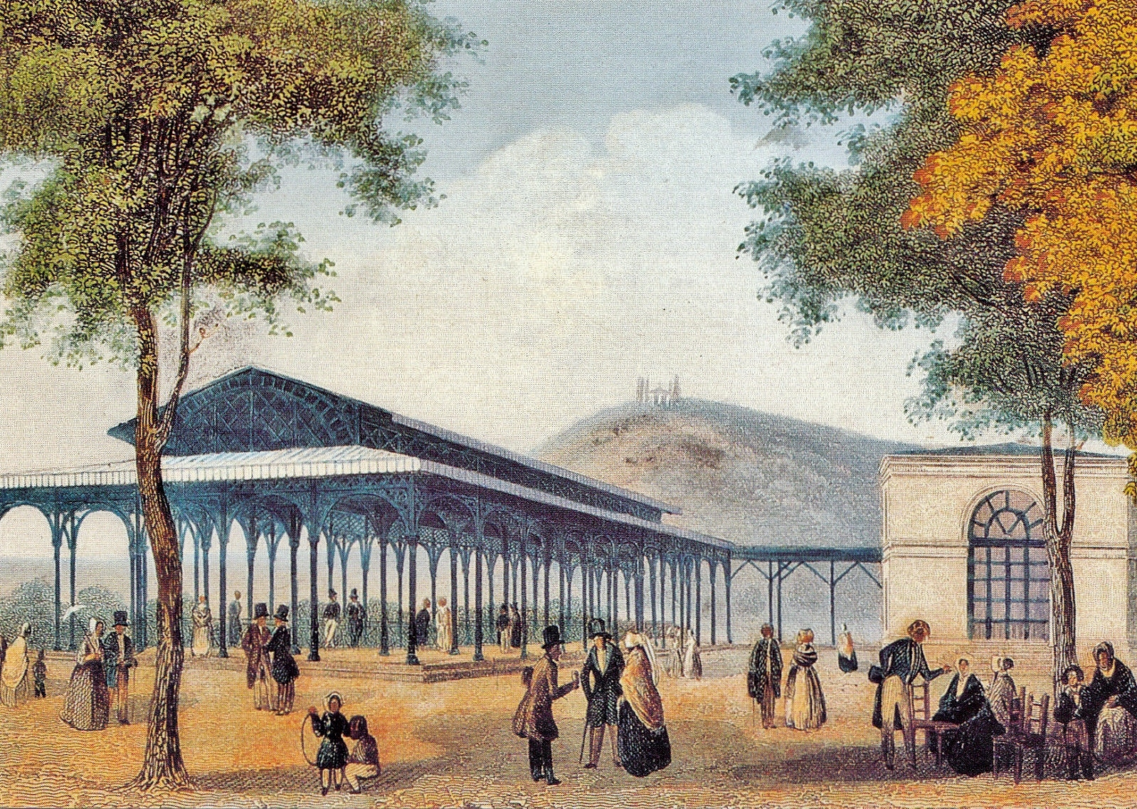 Gusseiserne Brunnenhalle in Bad Kissingen; erbaut 1842 von Friedrich von Gärtner